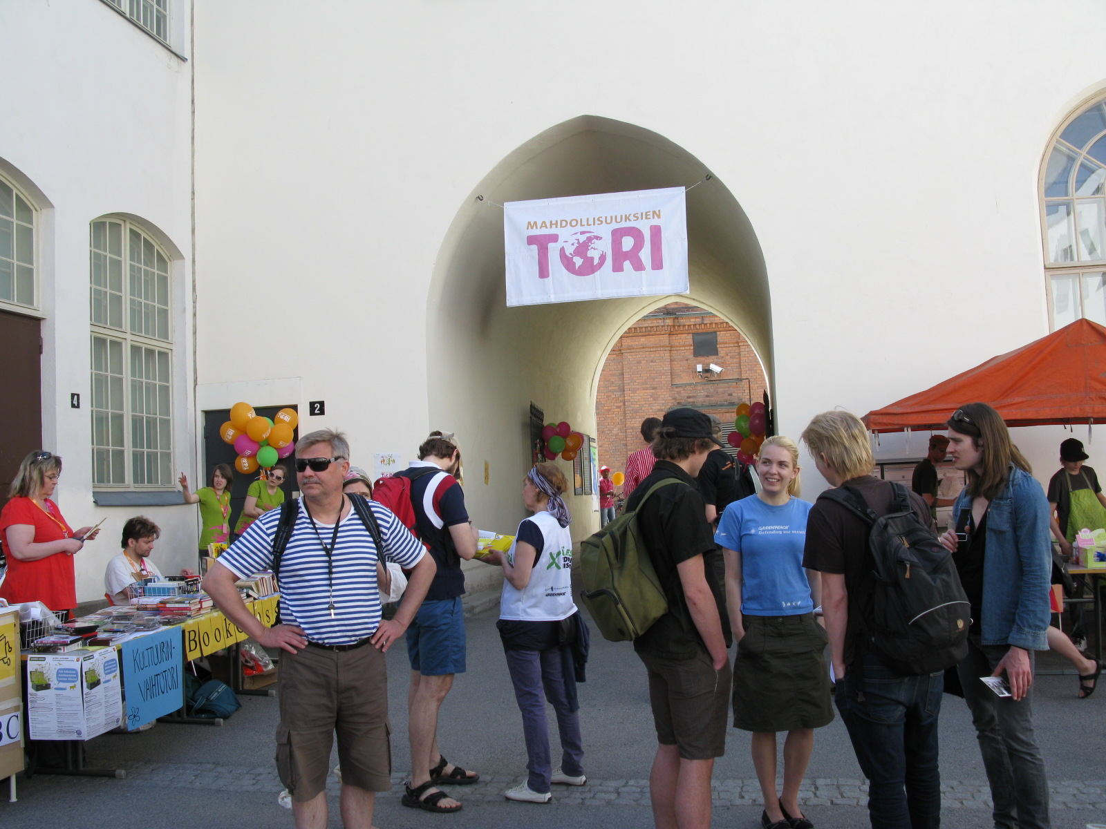 Tampereen Mahdollisuuksien Tori. 22.5.2010